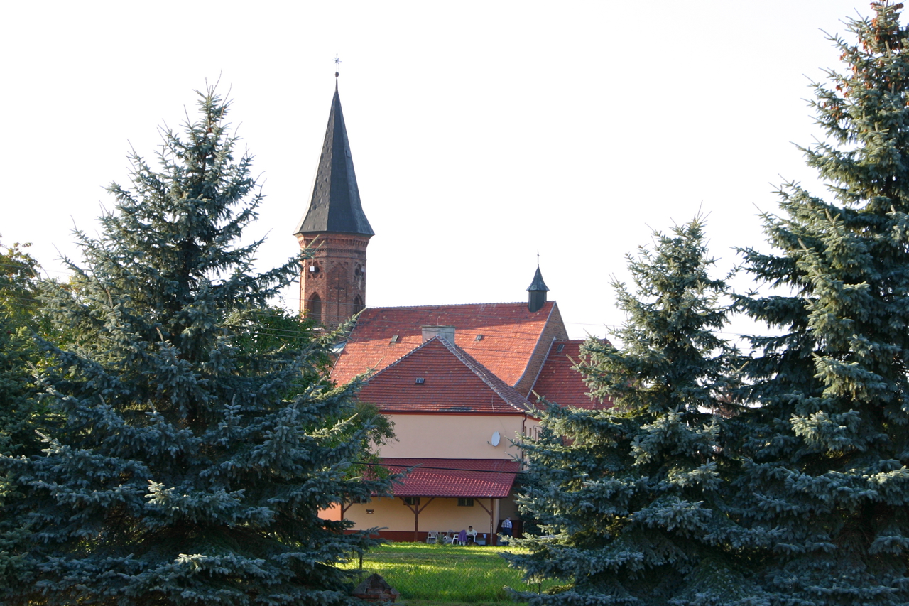 Kościół par. pw. Nawiedzenia NMP, z 1852 r., w Łężcach – wieś w Polsce położona w województwie opolskim, w powiecie kędzierzyńsko-kozielskim, w gminie Reńska Wieś.